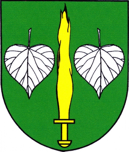 znak, Písečné, okres Žďár nad Sázavou